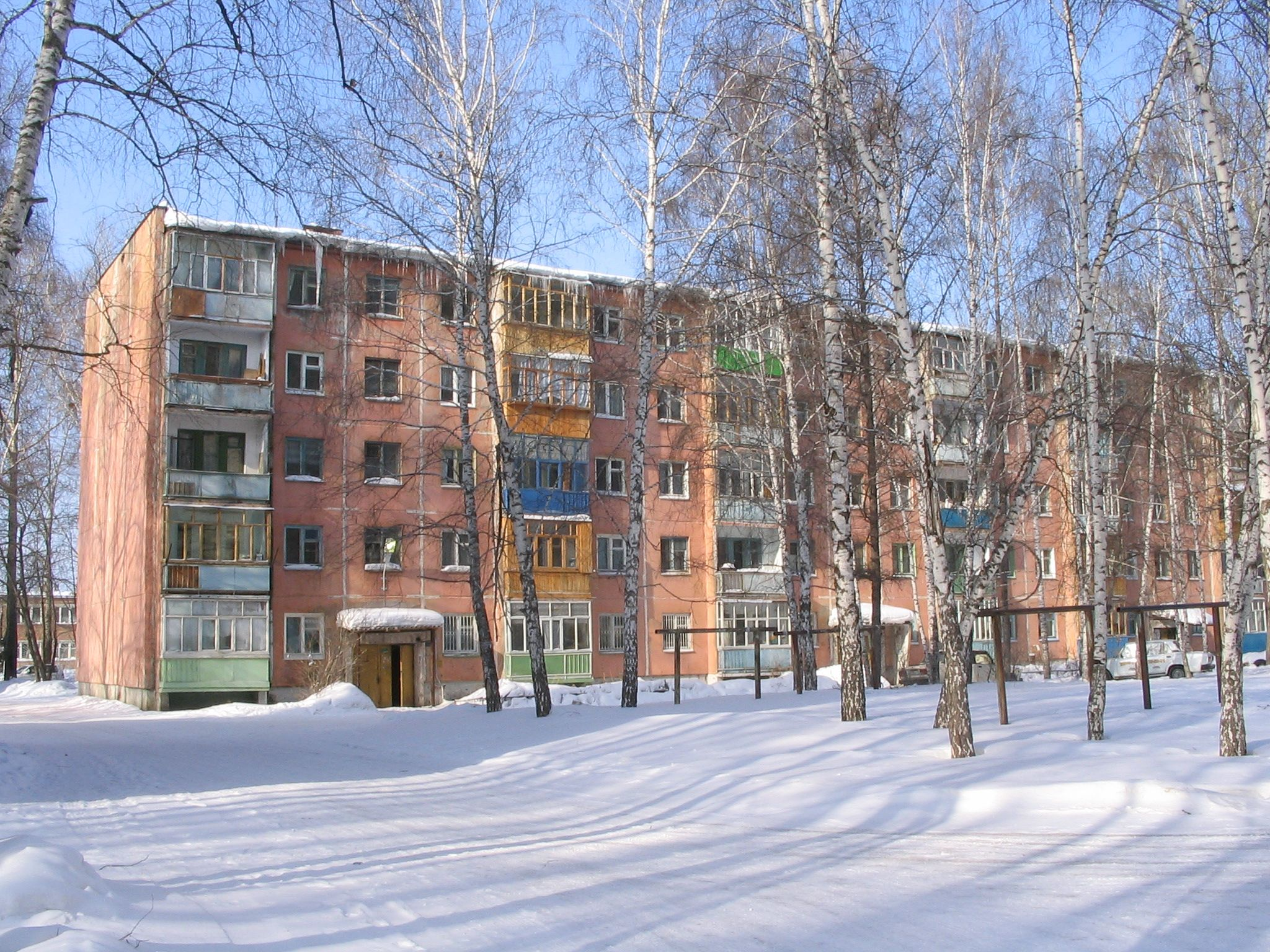 Panel Khrushchev house in Tomsk, Kulagina str.